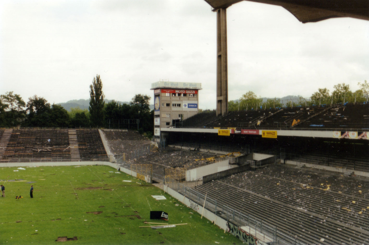 Wankdorf-Stadion, kurz vor dem Abbruch